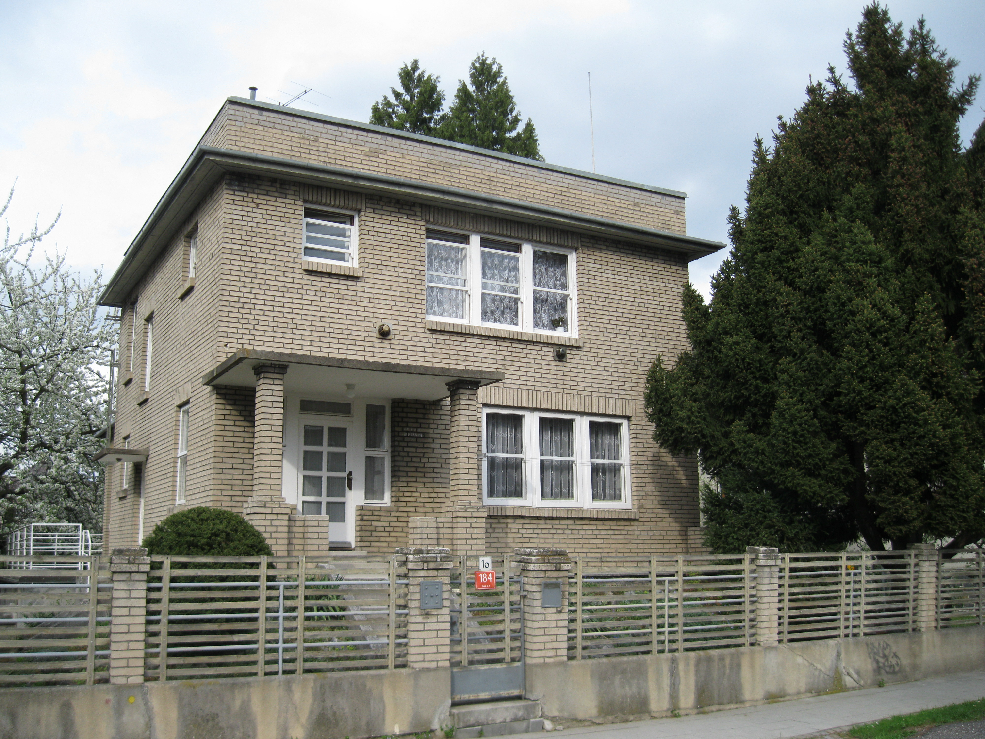 Rodinný dům R. Schneidera (Olomouc), Černochova 184/10, Olomouc